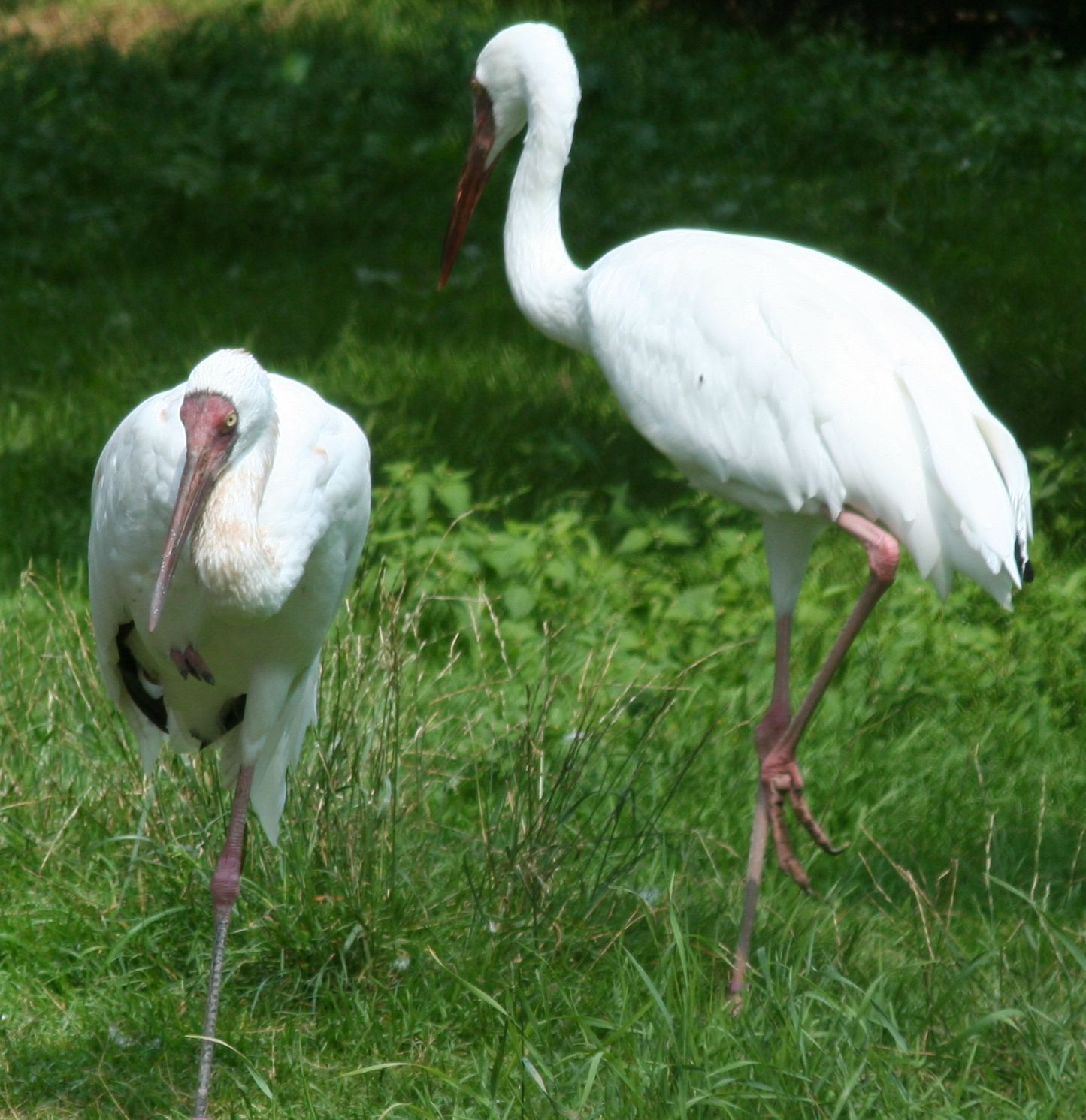 Grus leucogeranus , Vogelpark Walsrode